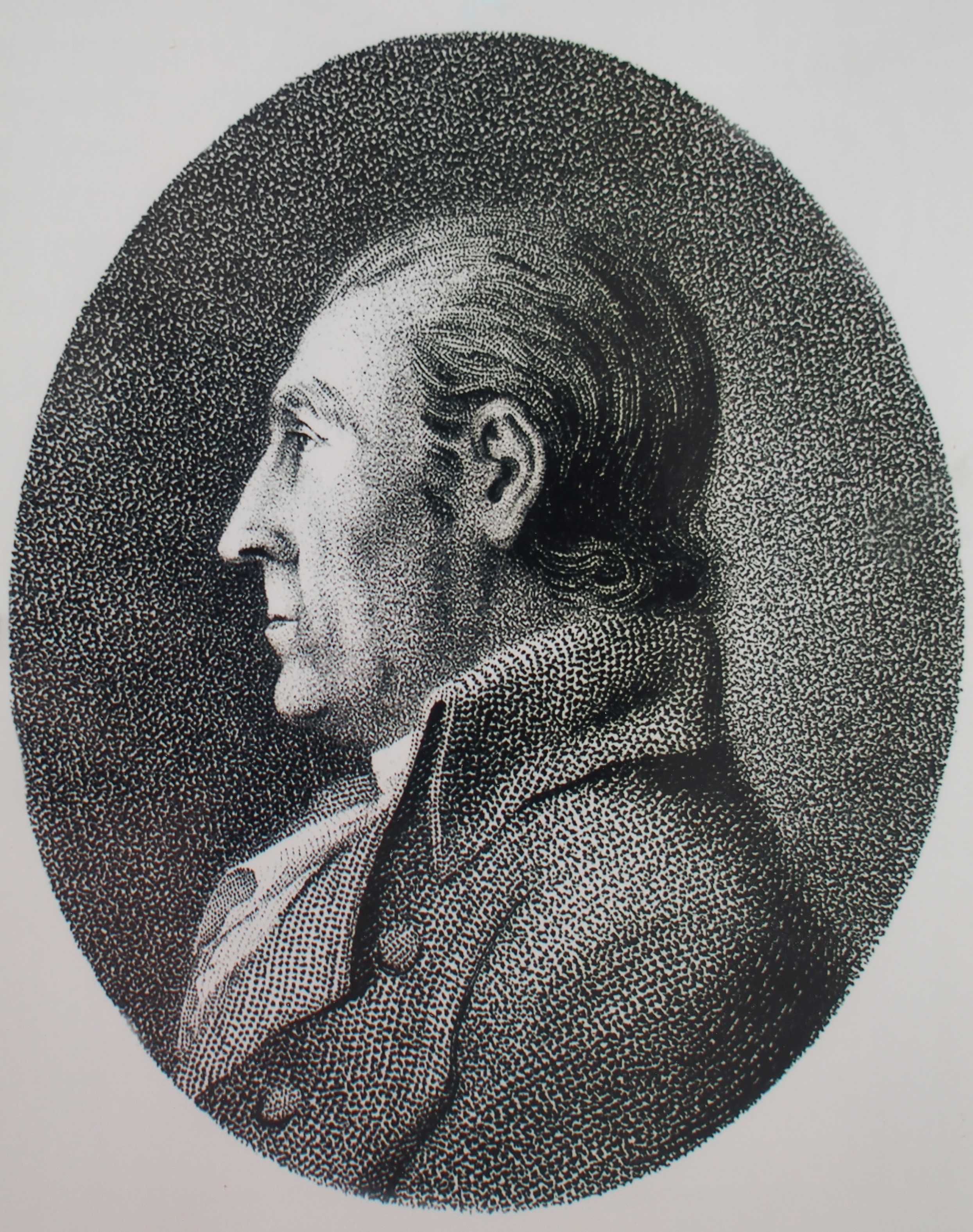 Johann Christoph Gatterer (1727-1799), Abb. Bestand App. dipl. Goett.